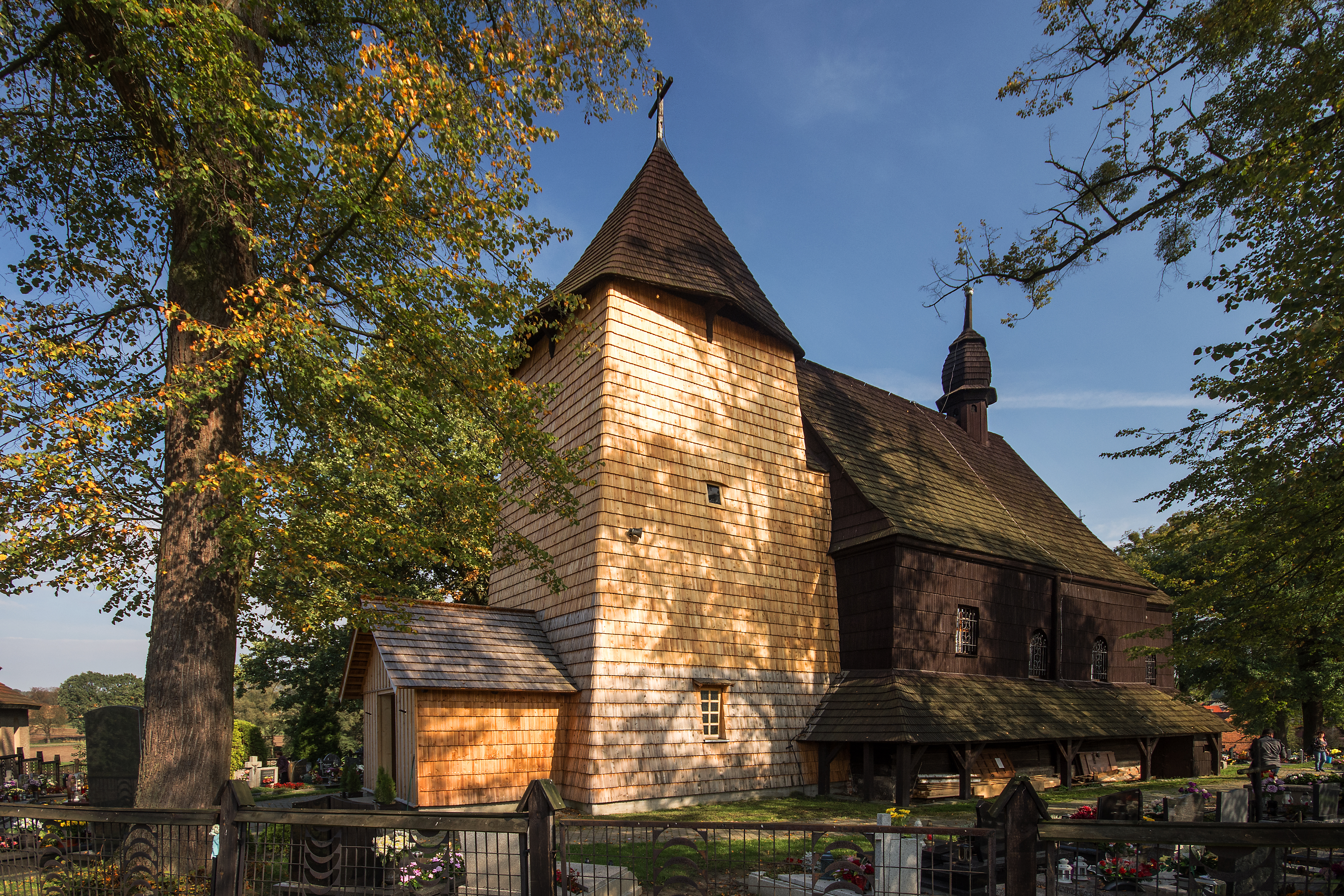 Sierakowice, kościół fil. p.w. św. Katarzyny Aleksandryjskiej, 1675, 1953